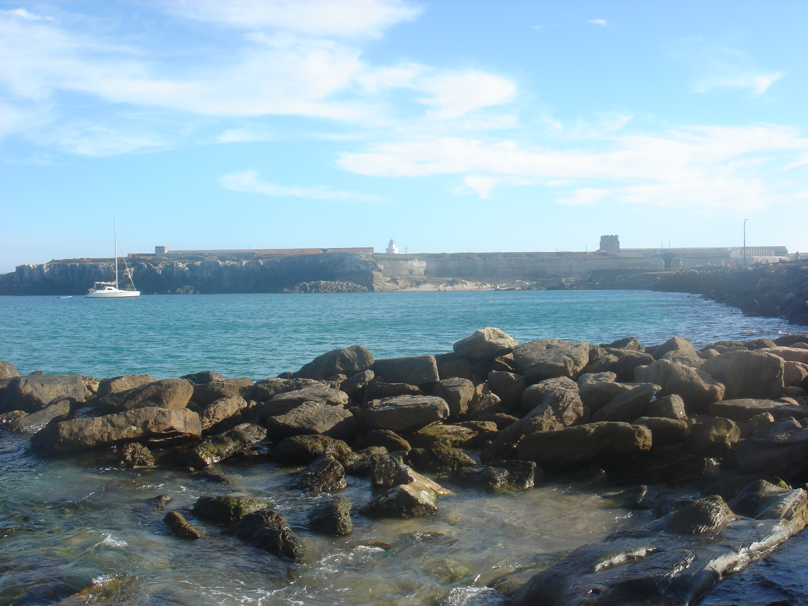 Vista parcial de la Isla de las Palomas desde Playa Chica